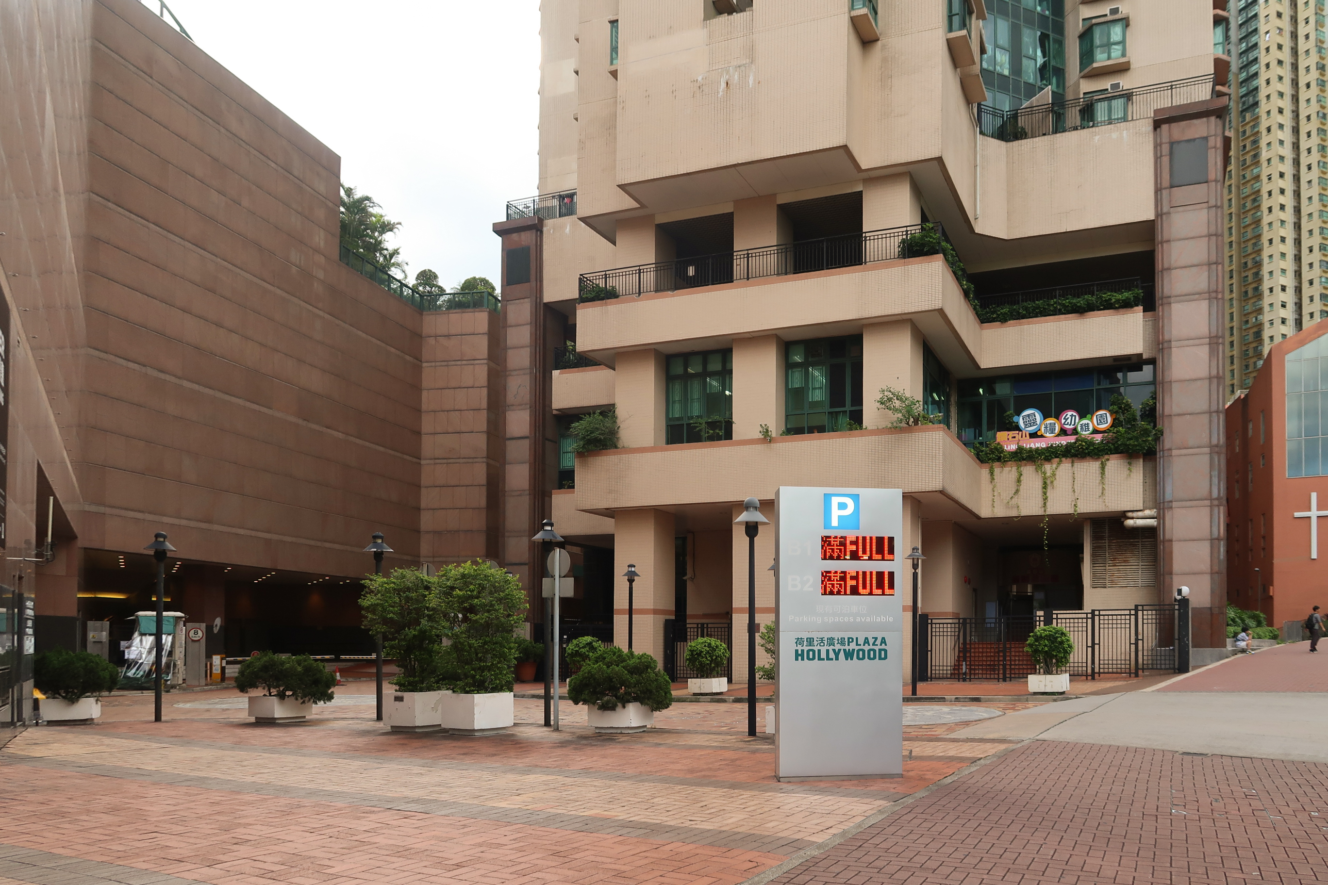 Diamond Hill Ling Liang Kindergarten